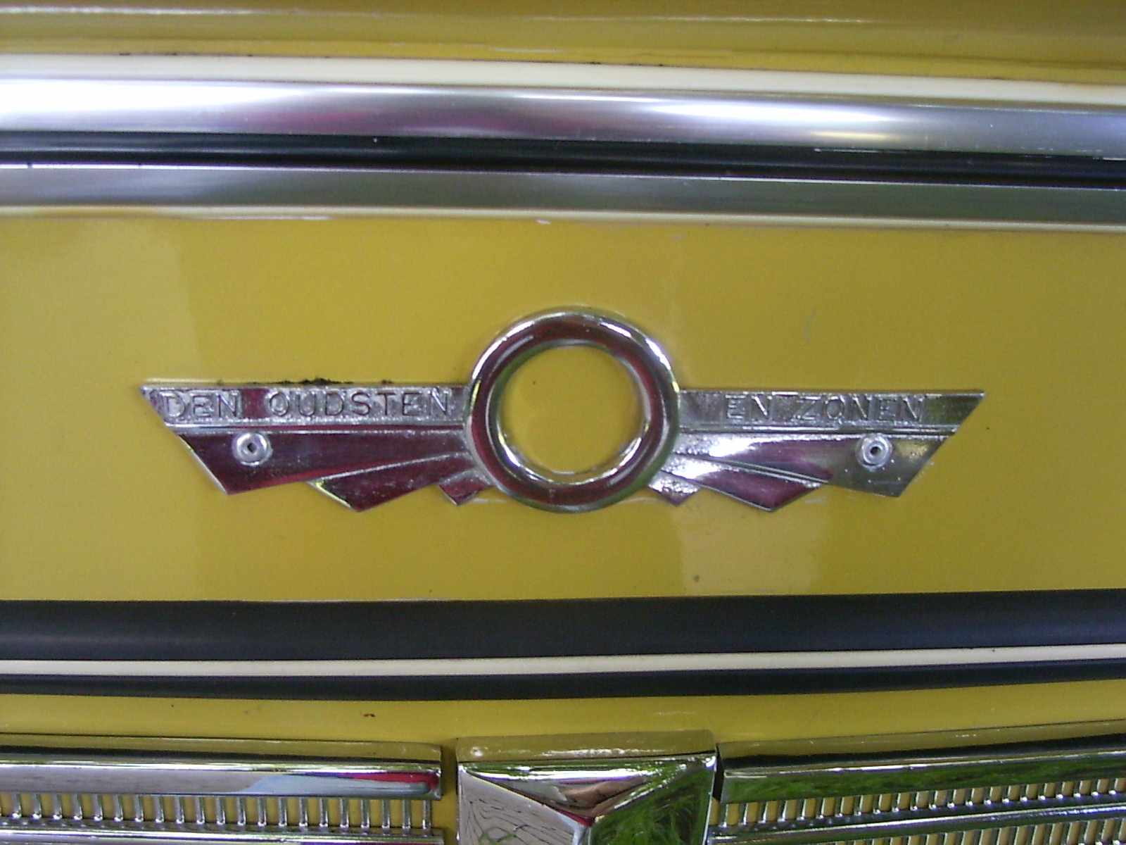 Museumbus Geldersche Tramwegen 475, gefotografeerd in het Openluchtmuseum: Den Oudsten beeldmerk